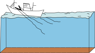 Esquema de pesca de bonito con anzuelo